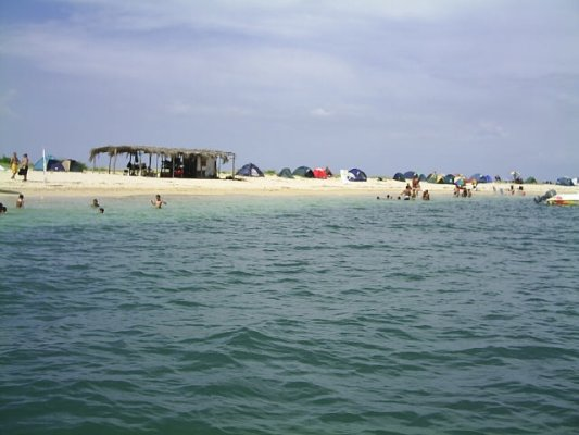 Isletas de Piritu, Estado Anzoategui, oriente de Venezuela